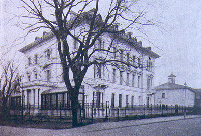 Dicksonska palatset, Göteborg (built 1862)